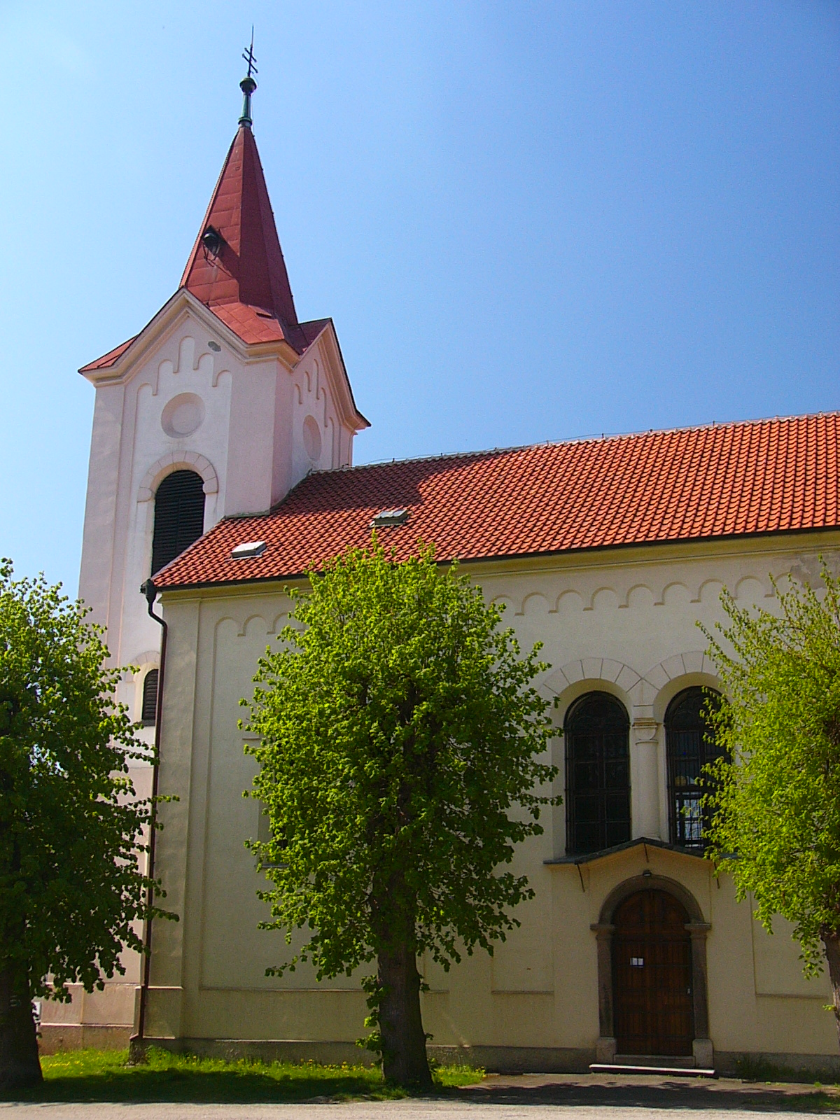 Kostel sv. Martina v Třebotově